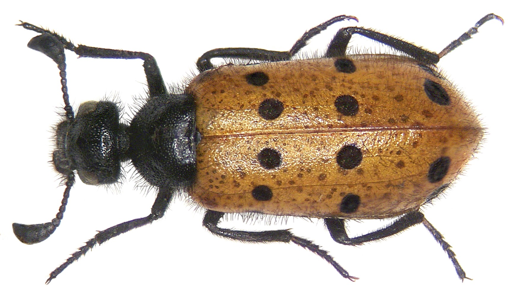 Actenodia distincta (Chevrolat, 1837) Familie: Meloidae Grösse: 7-14 mm Fundort: Marokko, Marrakech leg. det. U.Schmidt, 1995 Foto: U.Schmidt, 2006